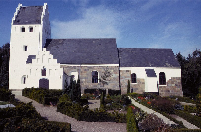 Brenderup Kirke i Danmark. Brenderup kirke